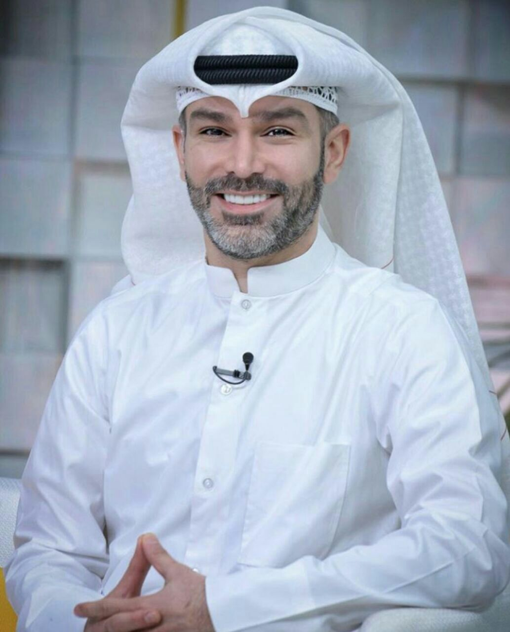 Hashem Assad